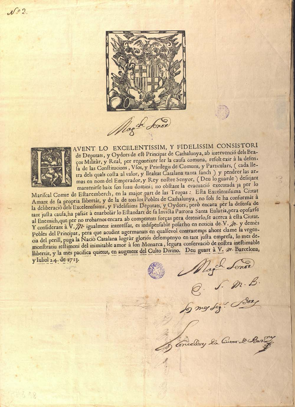 Carta de los Consellers de Barcelona a una población catalana indeterminada informando de su decisión de continuar la Guerra de Sucesión Española. 24 de julio de 1713. Letter from the Consellers of Barcelona to an undetermined Catalonian city informing of their decision of continuing the War of Spanish Succession. 24 July 1713.